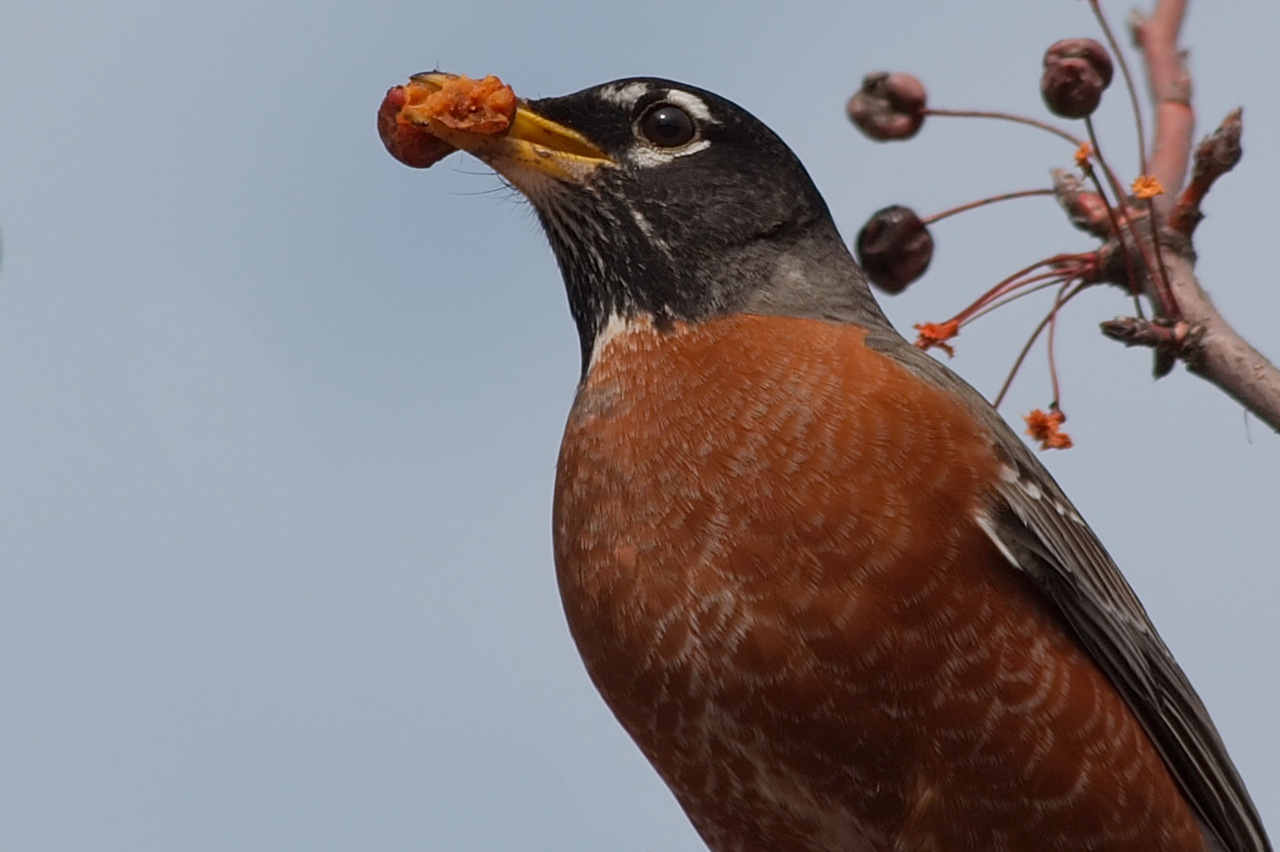 An american robin (Turdus migratorius), taken in Urbana, IL